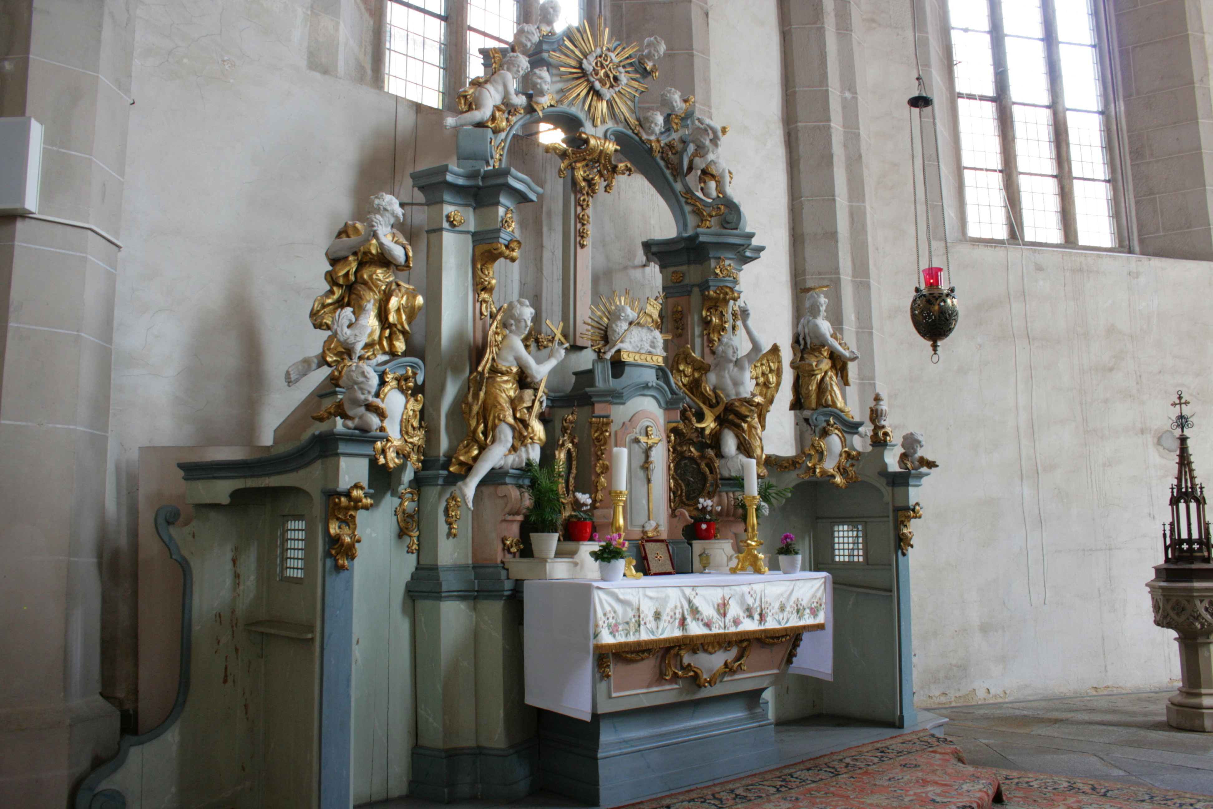 Dom St. Petri in Bautzen, katholischer Teil Hornjoserbsce: Tachantska cyrkej swj. Pětra w Budyšinje; katolski dźěl.